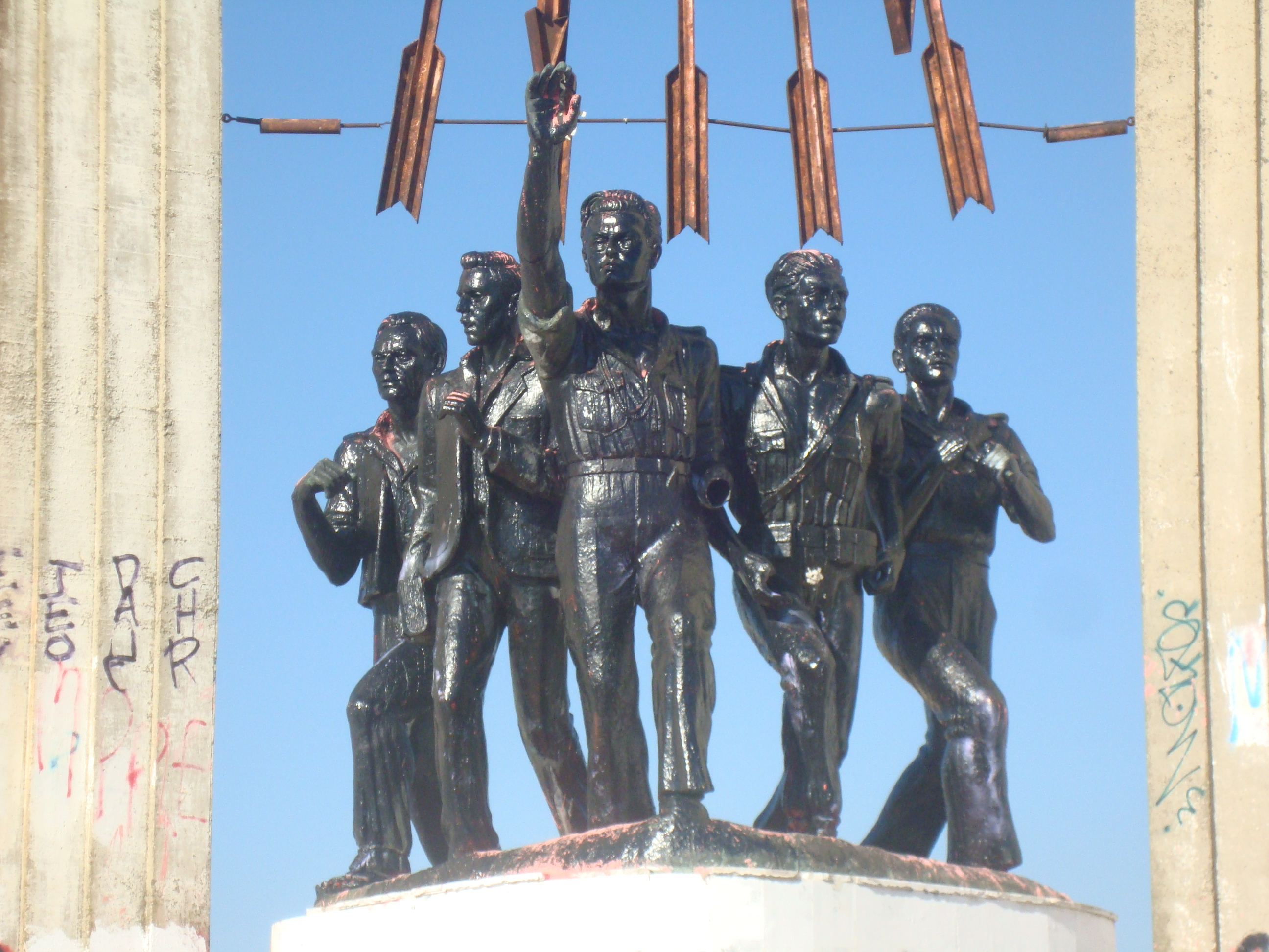 Monumento a Onésimo Redondo en el cerro de San Cristóbal (Valladolid).